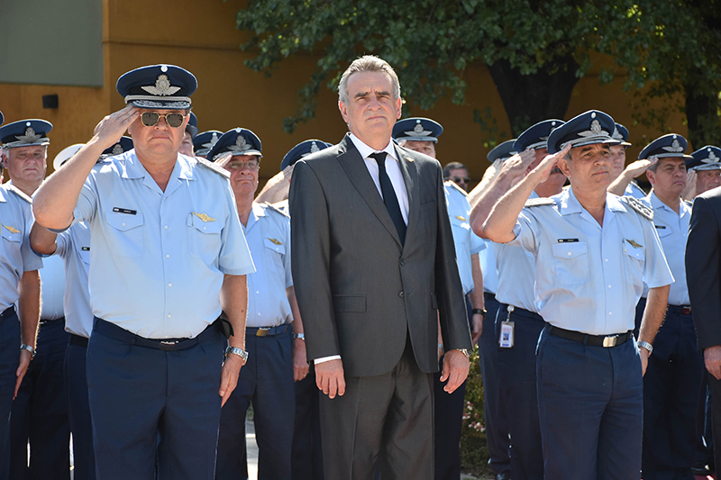 De izquierda a derecha: Brigadier General Enrique Víctor Amrein, Ing. Agustín Oscar Rossi y Brigadier Xavier Julián Isaac.